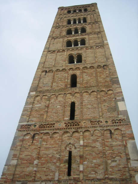 Turm der Abtei von Pomposa